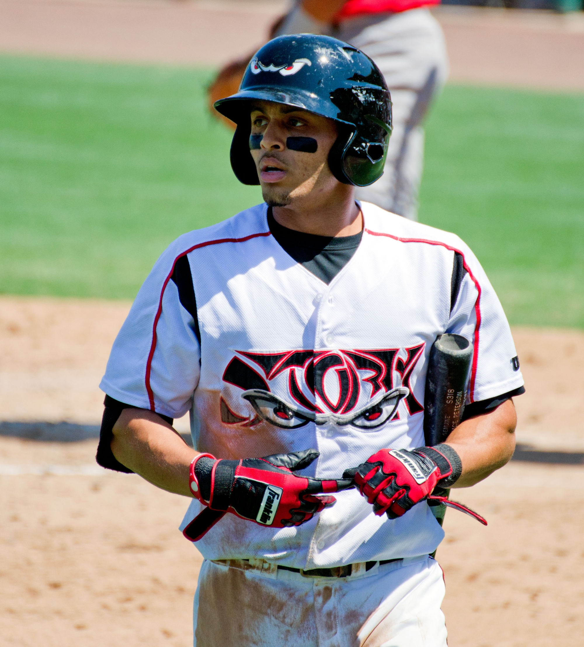 Rico Noel